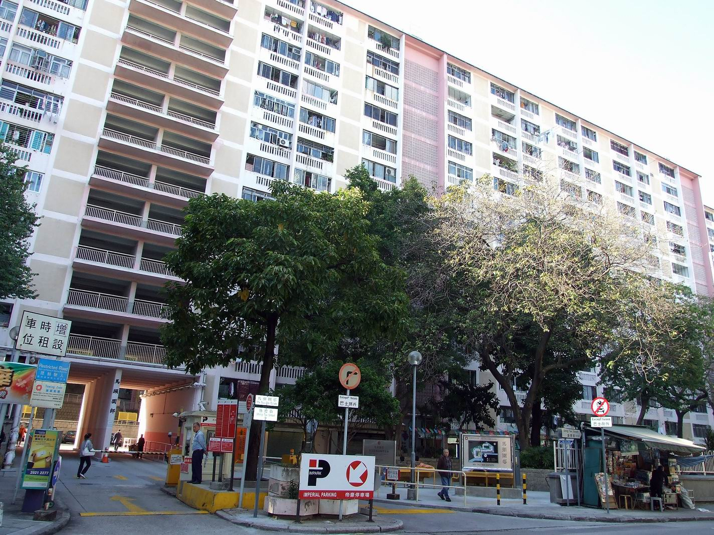 馬頭圍邨玫瑰樓